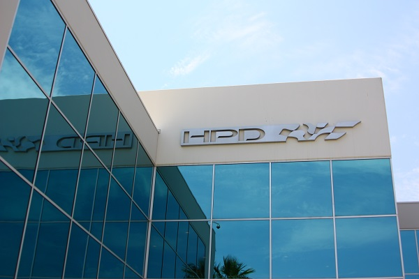 HPD，Honda Performance Development, Inc.